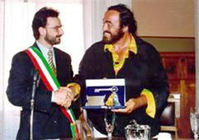 Il Sindaco Pariali consegna le chiavi della città a Pavarotti